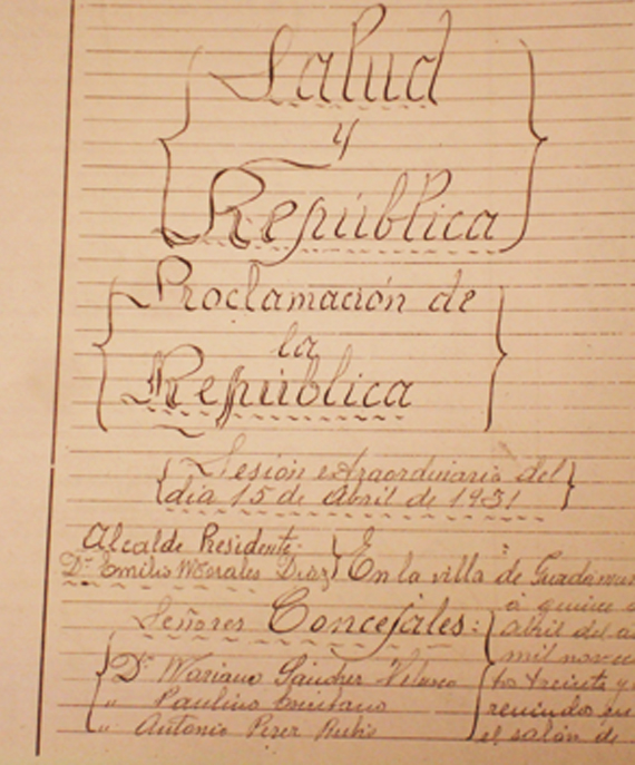 Acta del libro de plenos del Ayuntamiento de Guadamur del 15 de abril de 1931, que recoge la proclamación de la II República.